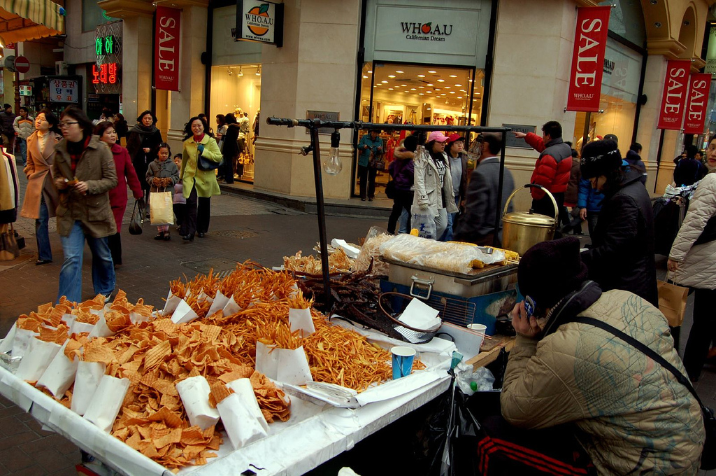 Myeongdong, Seoul